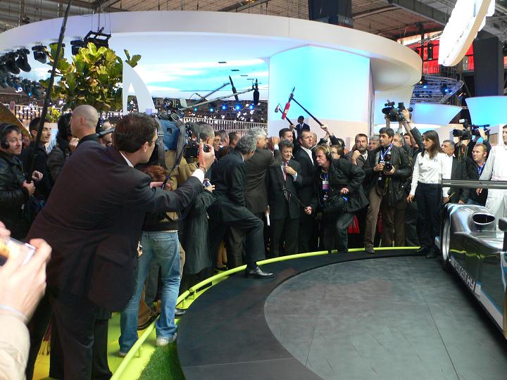 Jean Louis Borloo au Salon de l'Auto de Paris 2008